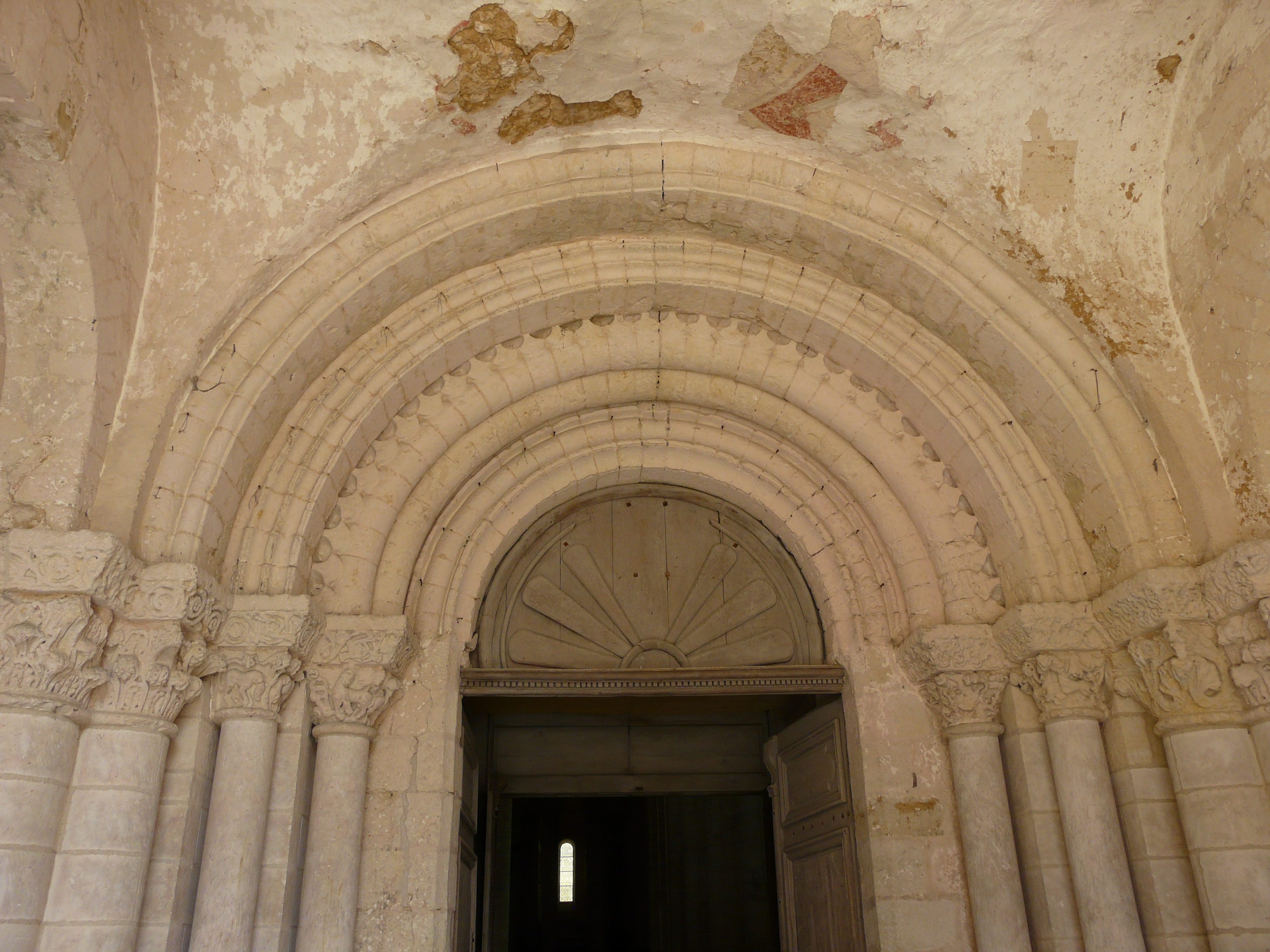 Le porche intérieur situé dans le narthex de l'église abbatiale Saint-Pierre d'Airvault, Deux-Sèvres, France